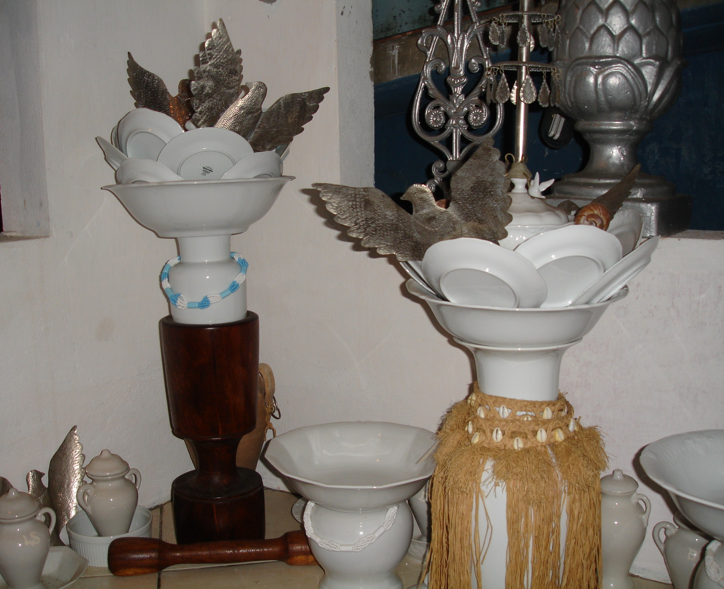 Acentamento de Oxaguian e Oxalufan